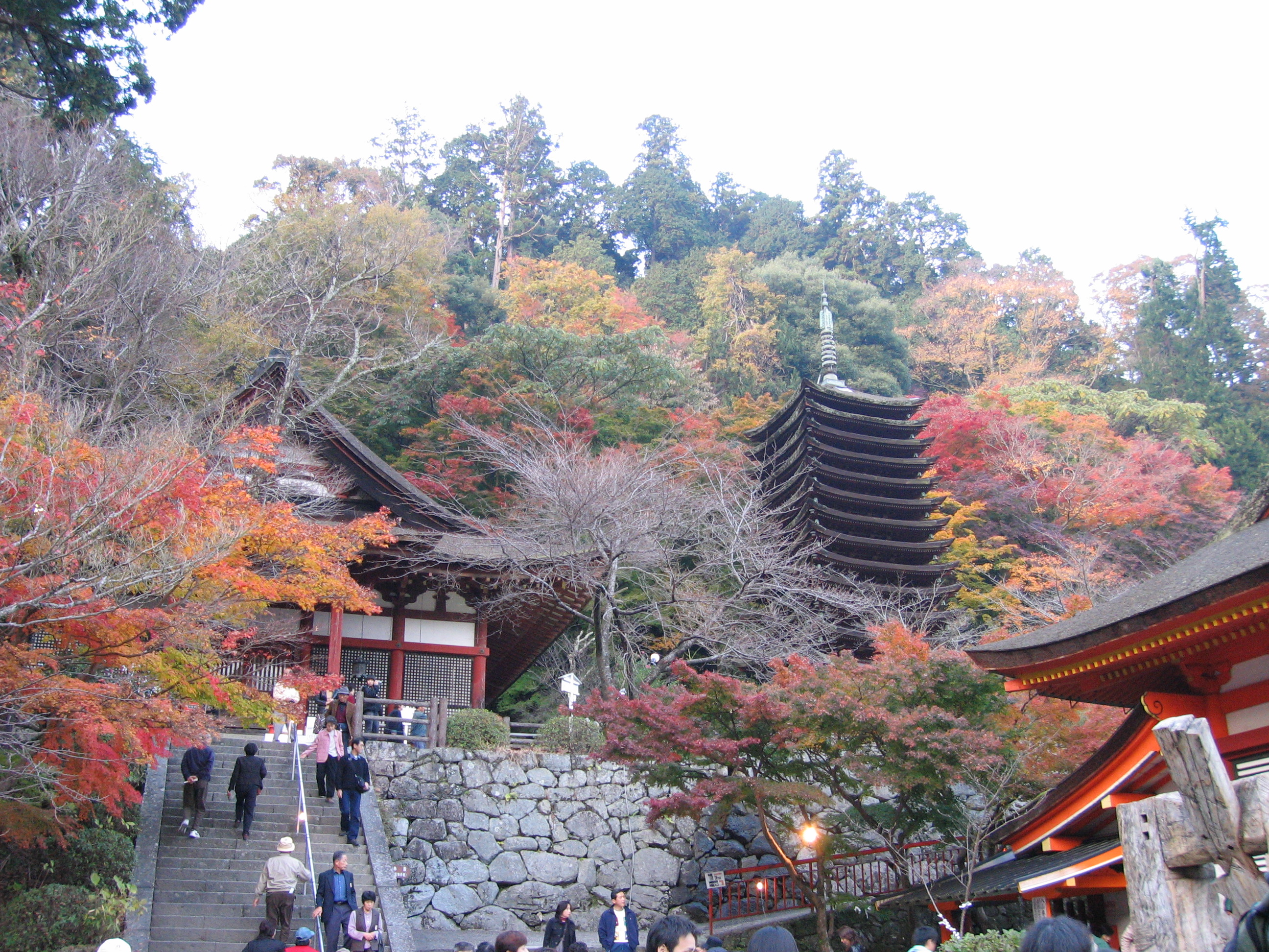 紅葉の談山神社